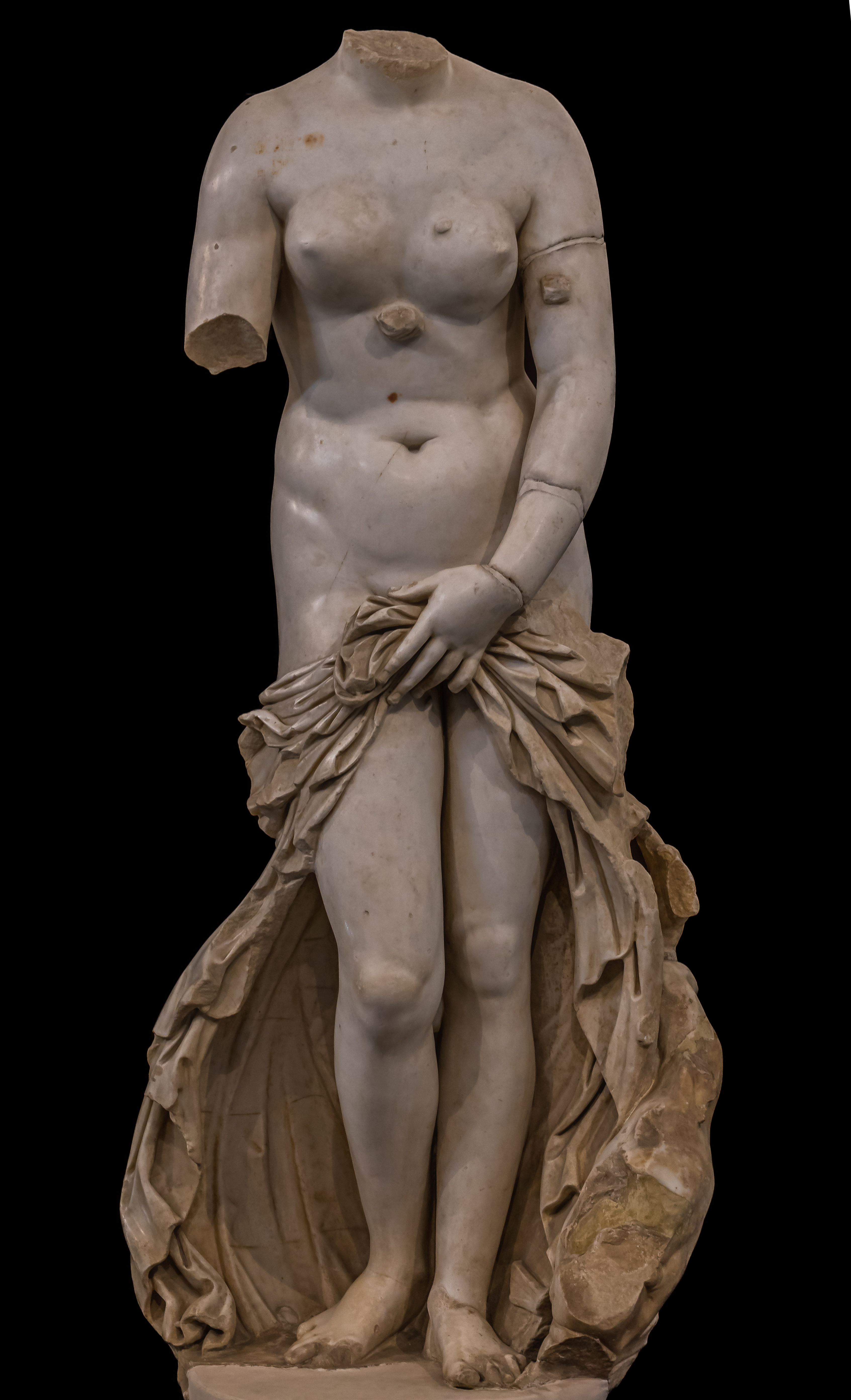 Statue der Aphrodite von Knidos aus Marmor vom Typus der Venus pudica. Eine römische Kopie aus dem 2. Jahrhundert, die nach dem Archäologen Saverio Landolina als Venus Landolina bezeichnet wird.